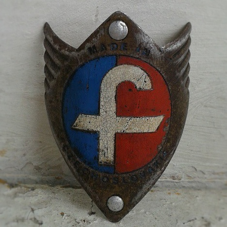 Stitek